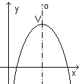 Parabola v kartézském souřadnicovém systému rozvírající se do záporné části osy y.